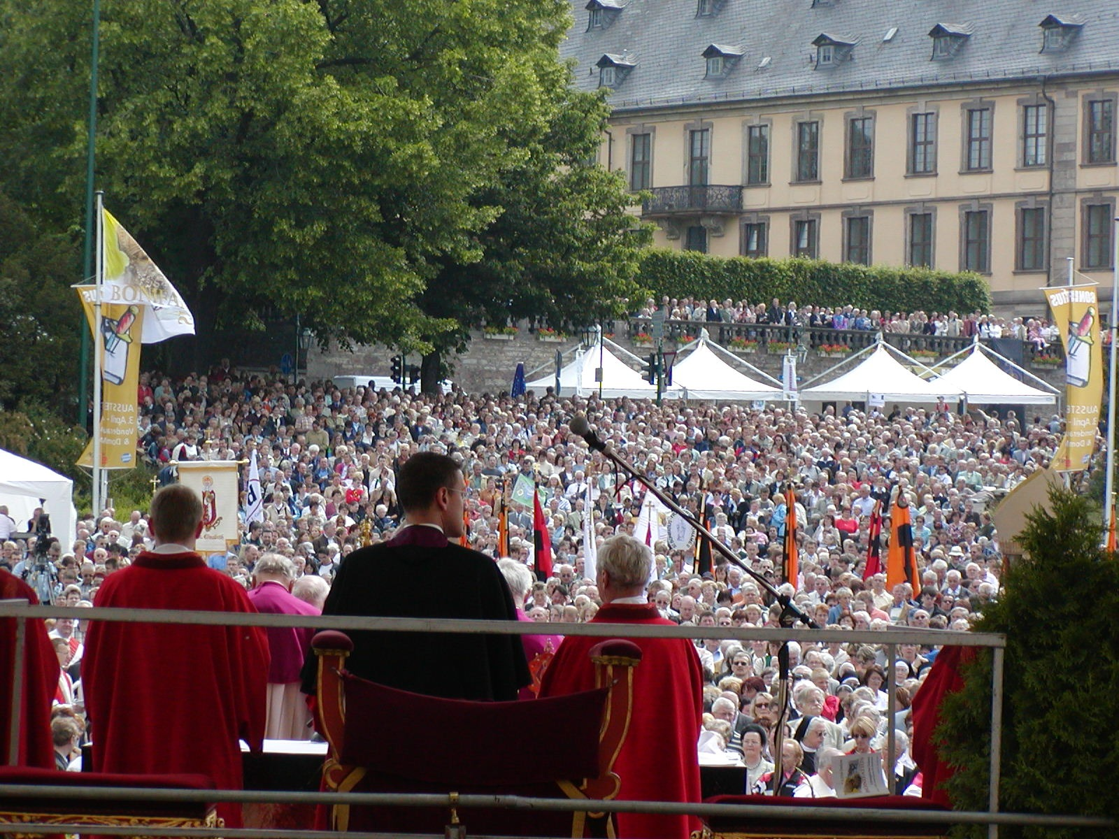 Bonifatiusfest Fulda, Gottesdienst nach der Wallfahrt